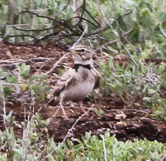 Melanocorypha bimaculata